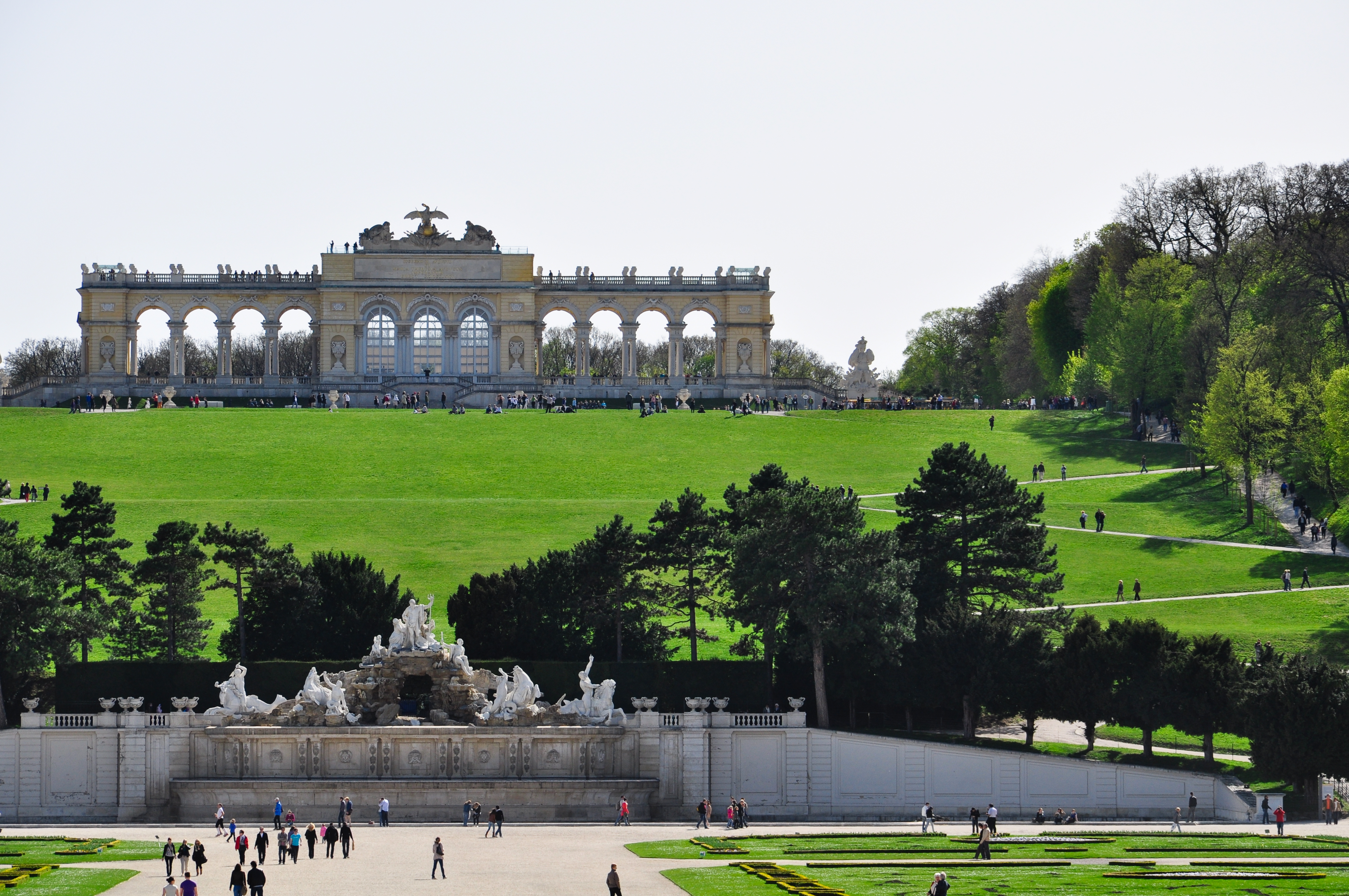 Gloriette, Gesamtanlage, Schloss Schönbrunn